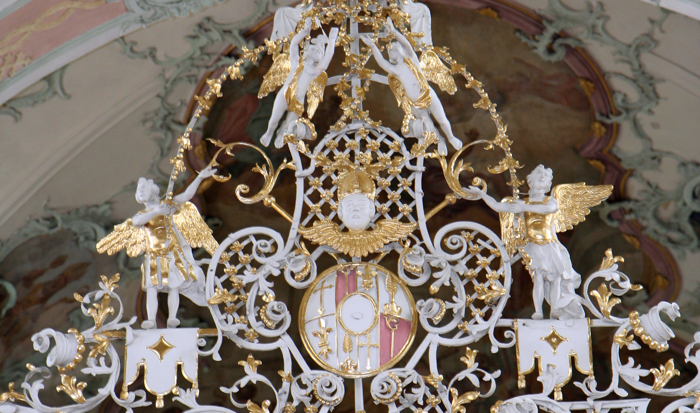 Chorgitter in der römisch-katholischen Pfarrkirche St. Ulrich und Afra, ehemals Kirche des Augustiner-Chorherrenstifts Kreuzlingen, in Kreuzlingen. Das Chorgitter wurde 1737 vom Konstanzer Kunstschlosser Johann Jakob Hoffner geschaffen. Detail: Kombination des Wappens des Abts des Klosters Kreuzlingen, Johann Baptist Dannegger (bestehend aus einer Lilie und einer Tanne) mit dem Wappen des Stifts Kreuzlingen (mit Abtsstab und Kreuz). Über den kombinierten Wappen befindet sich ein Abtskopf mit Engelflügeln.